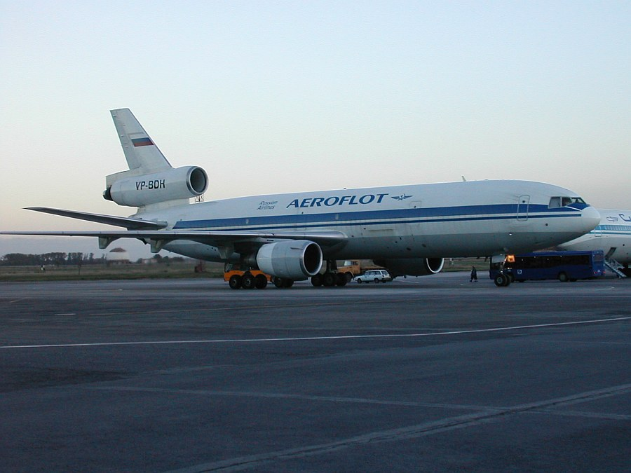 VP-BDH Samolot DC-10 w wersji cargo w barwach linii Aerofłot na lotnisku Nowosybirsk-Tołmaczewo, 23 sierpnia 2005 r.